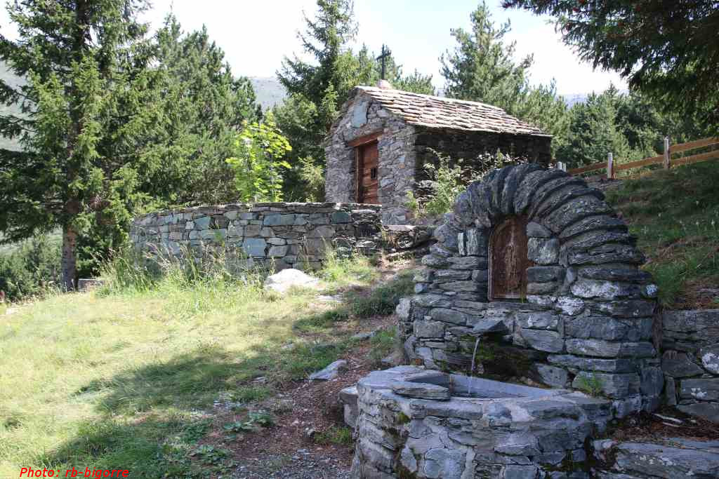 La chapelle Saint Barnabé à Vallcebollère